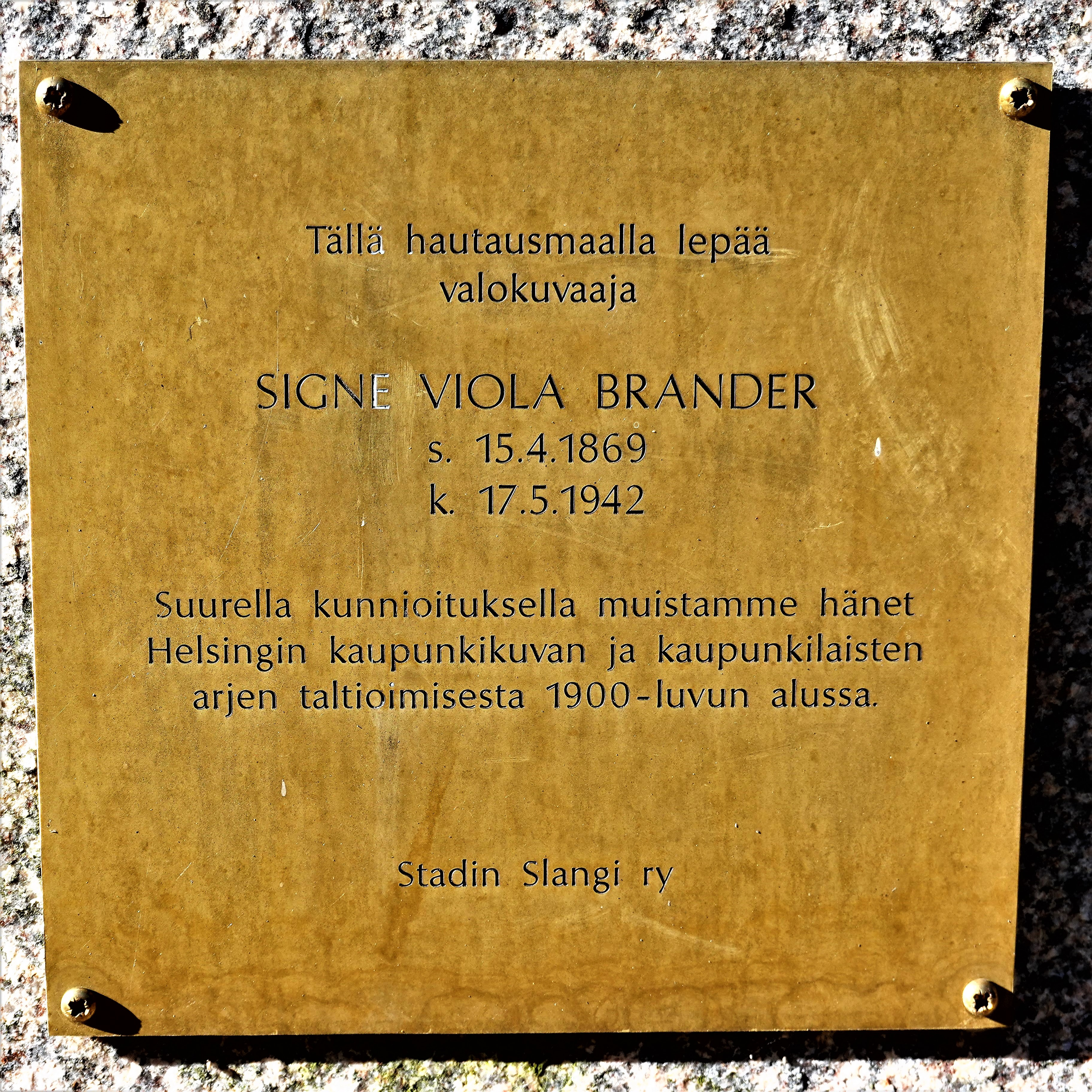 medtallilaatta, ruuvit, tekstejä